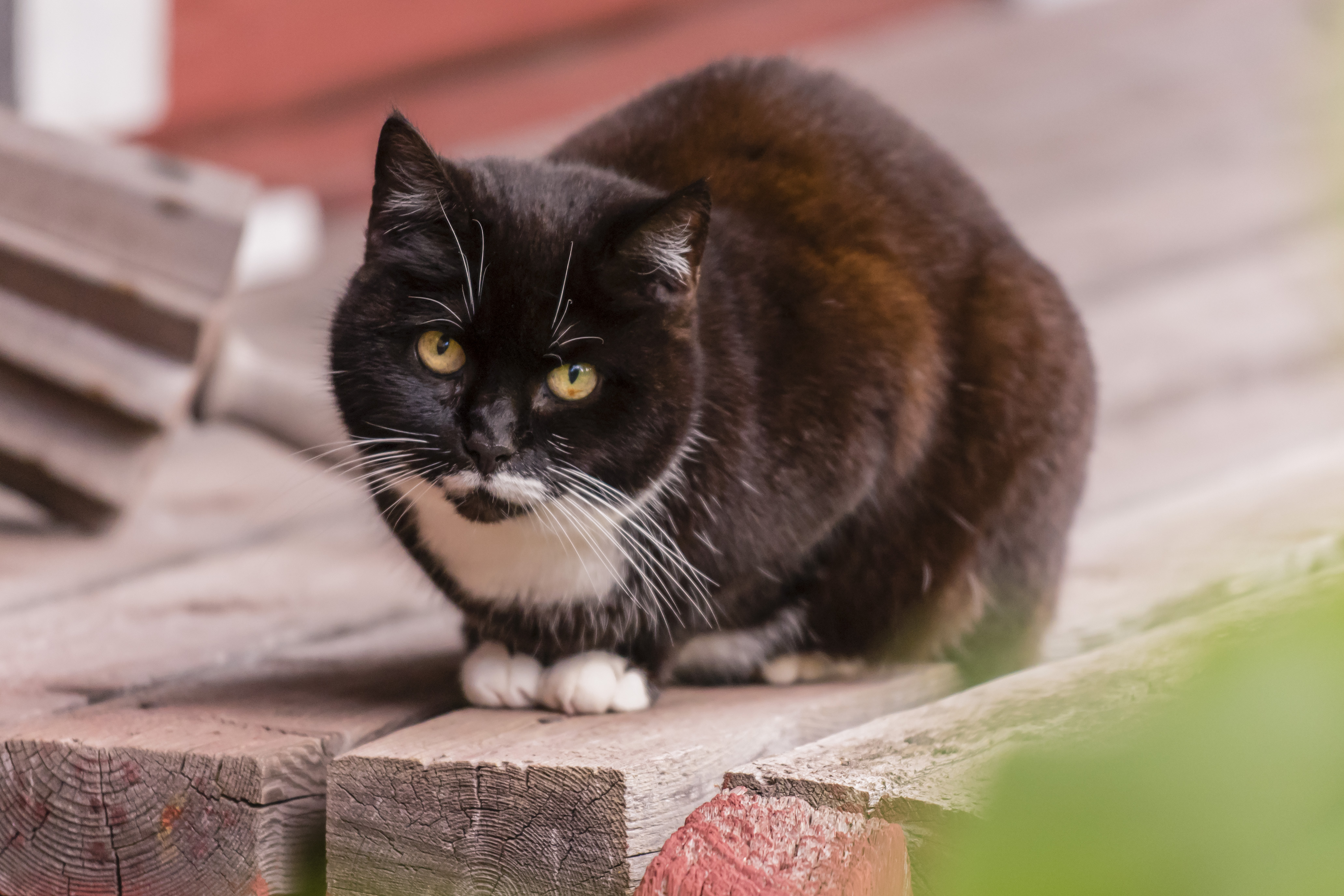 Lovisa, Finland